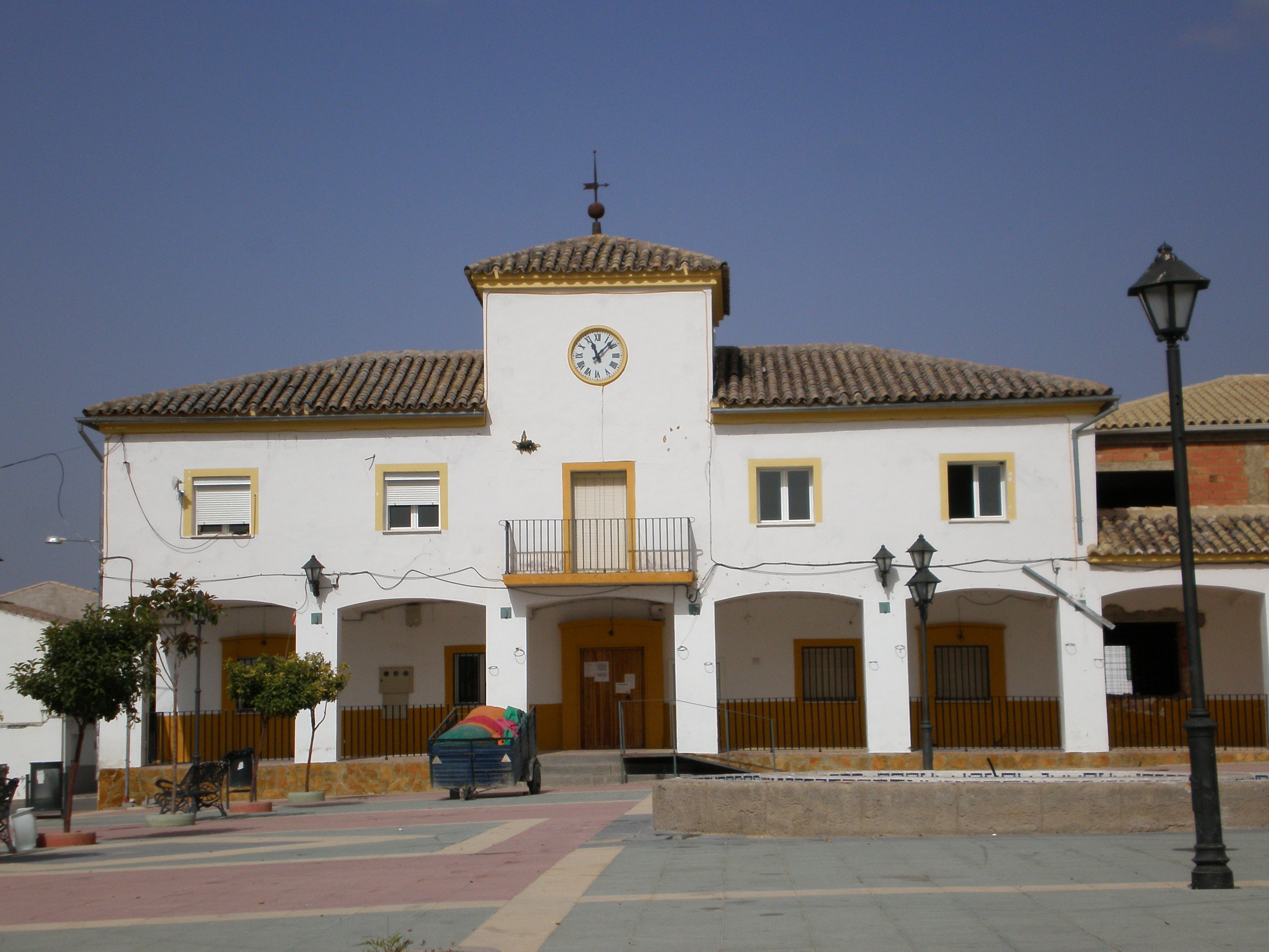 Vista frontal del Ayuntamiento de Campillo del Rio